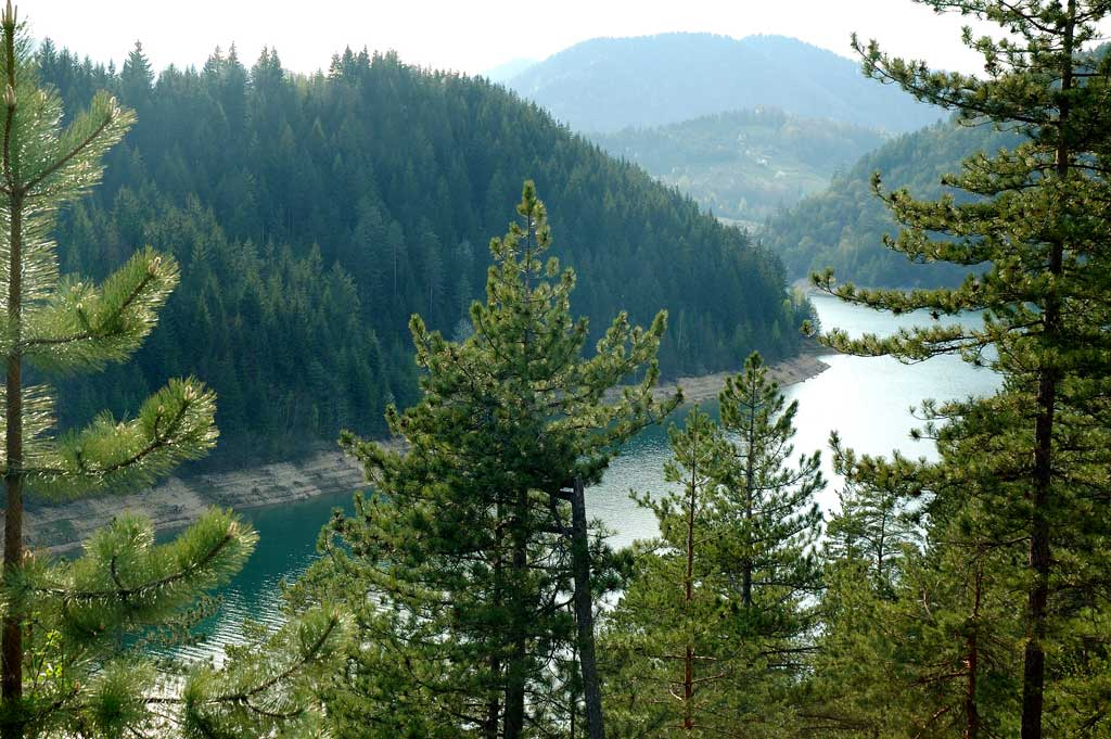 Српски (ћирилица): Река Дрина